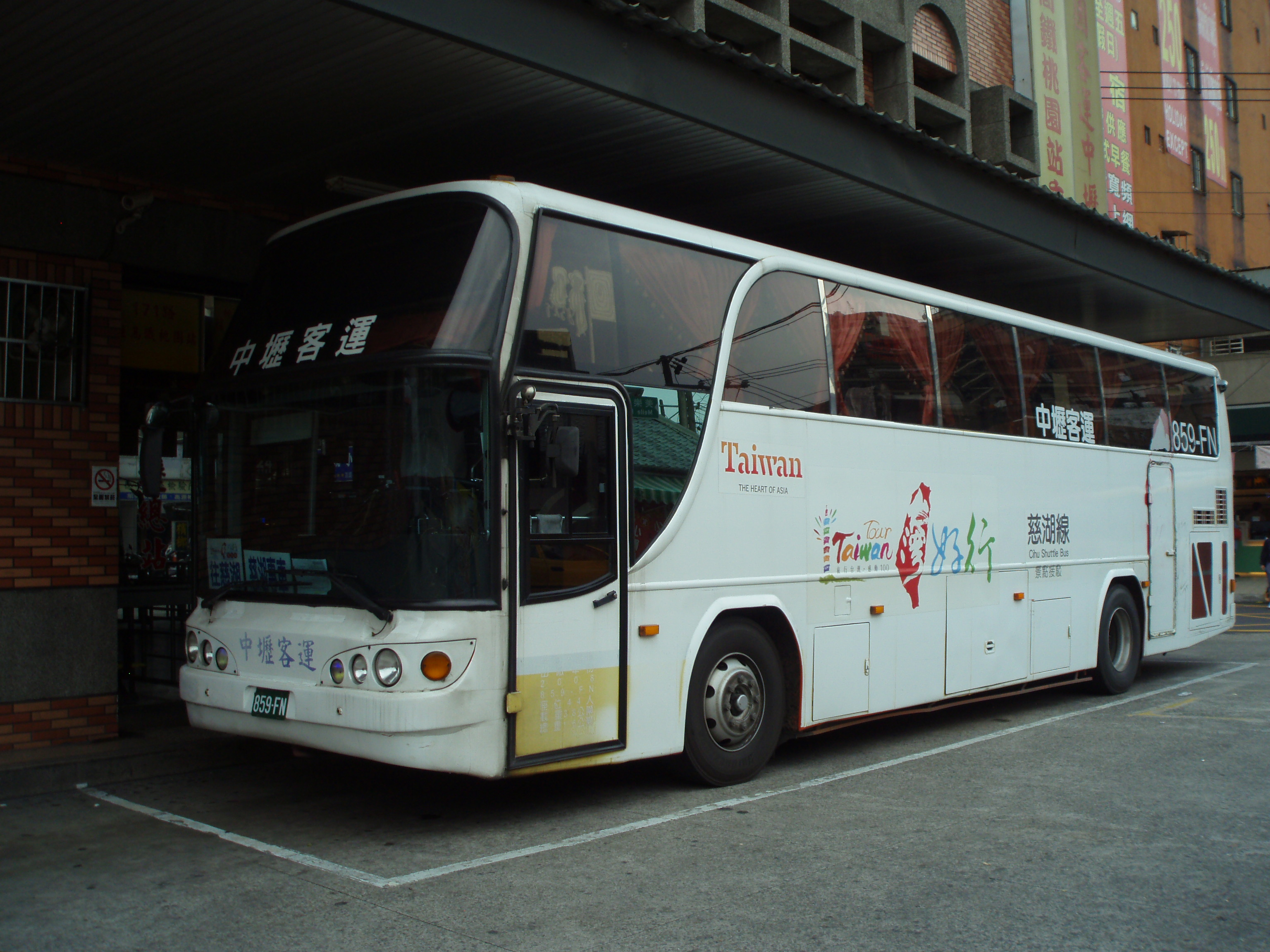 2008年中壢客運共採購6輛大車(853-FN~859-FN)，856-FN.858-FN.859-FN為原台灣好行慈湖線配車